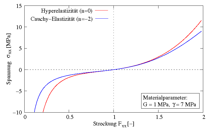 Spannungen im einaxialen Zugversuch